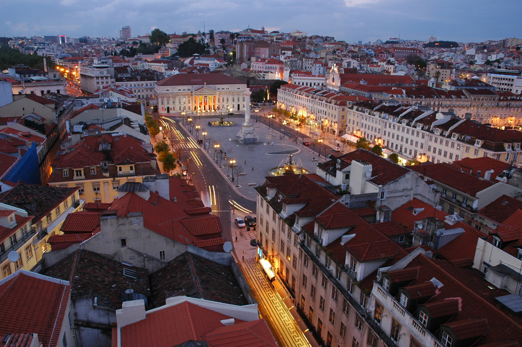 Praça Dom Pedro IV (Rossio)